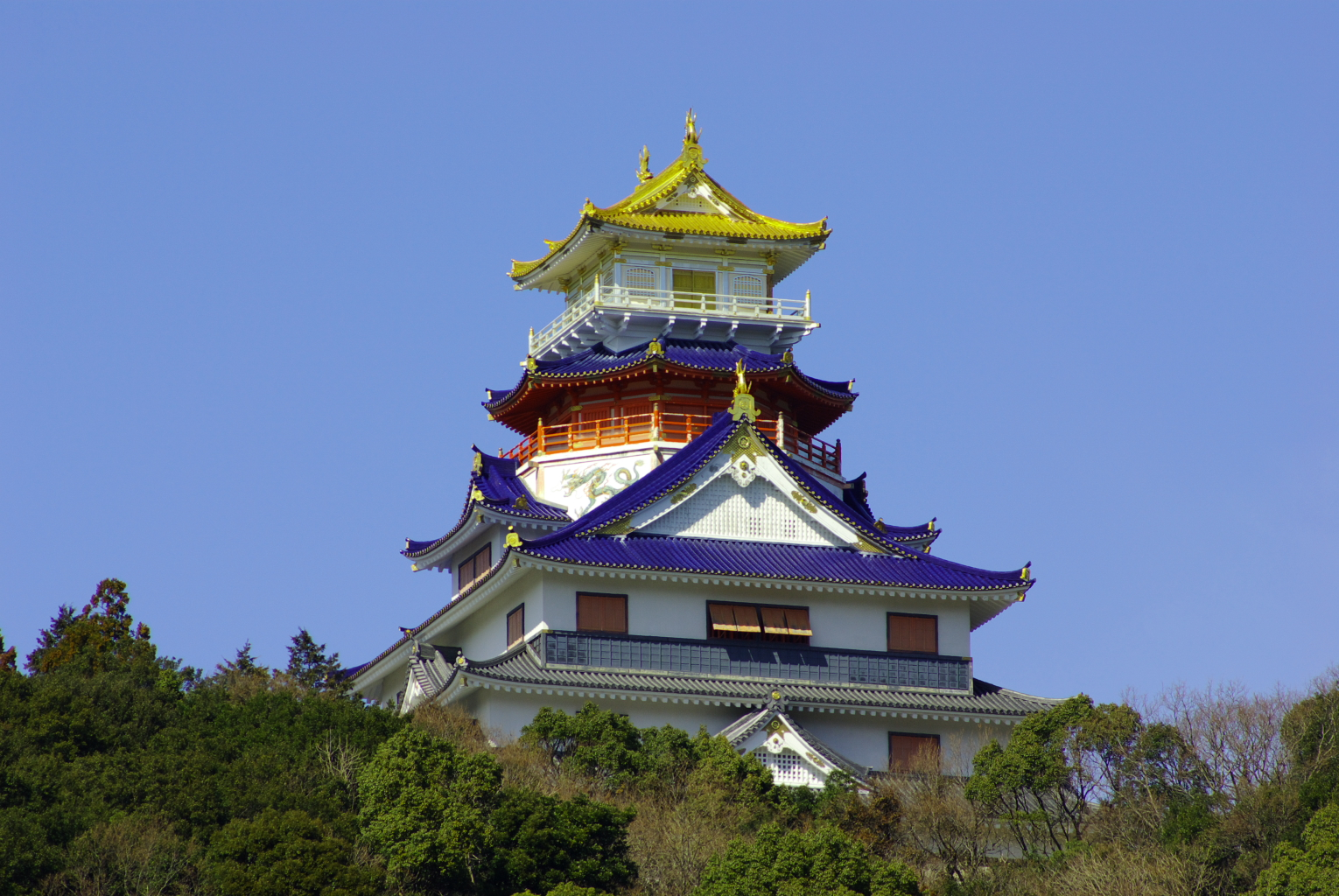 三重県伊勢市の安土城模擬天主。南方より